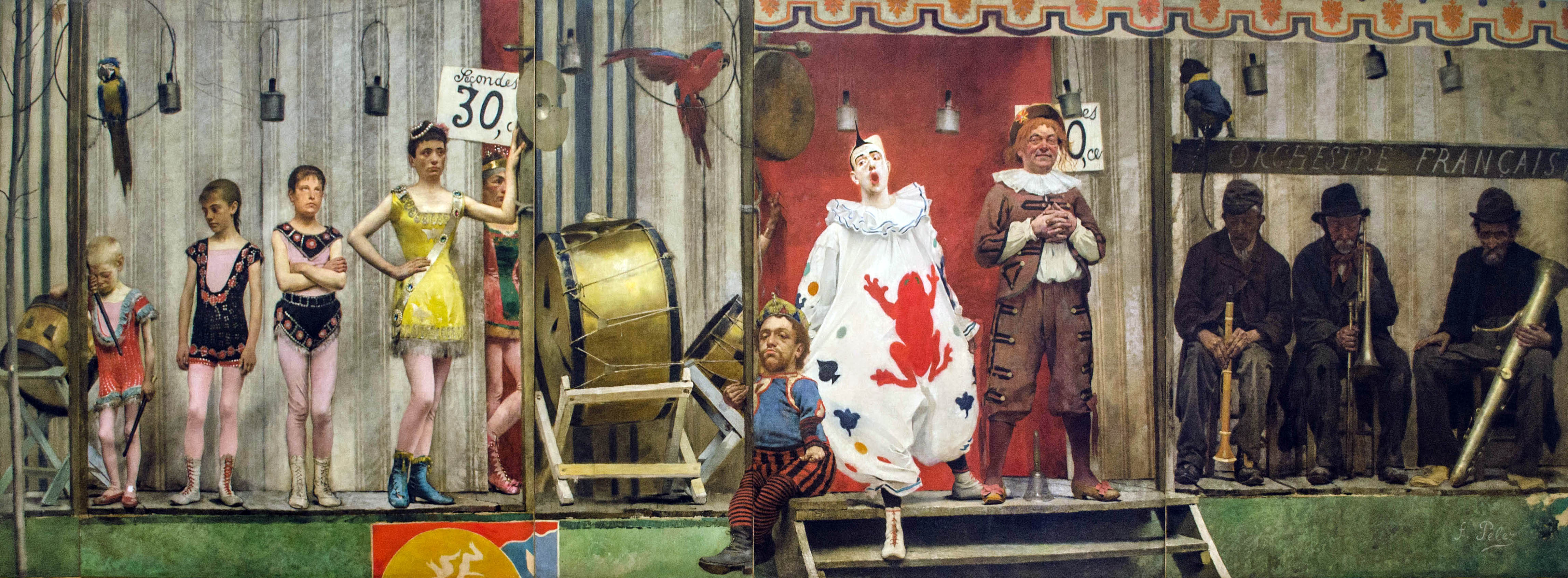 Fernand Pelez, Les Saltimbanques, huile sur toile, 1888, Musée du Petit Palais, Paris.